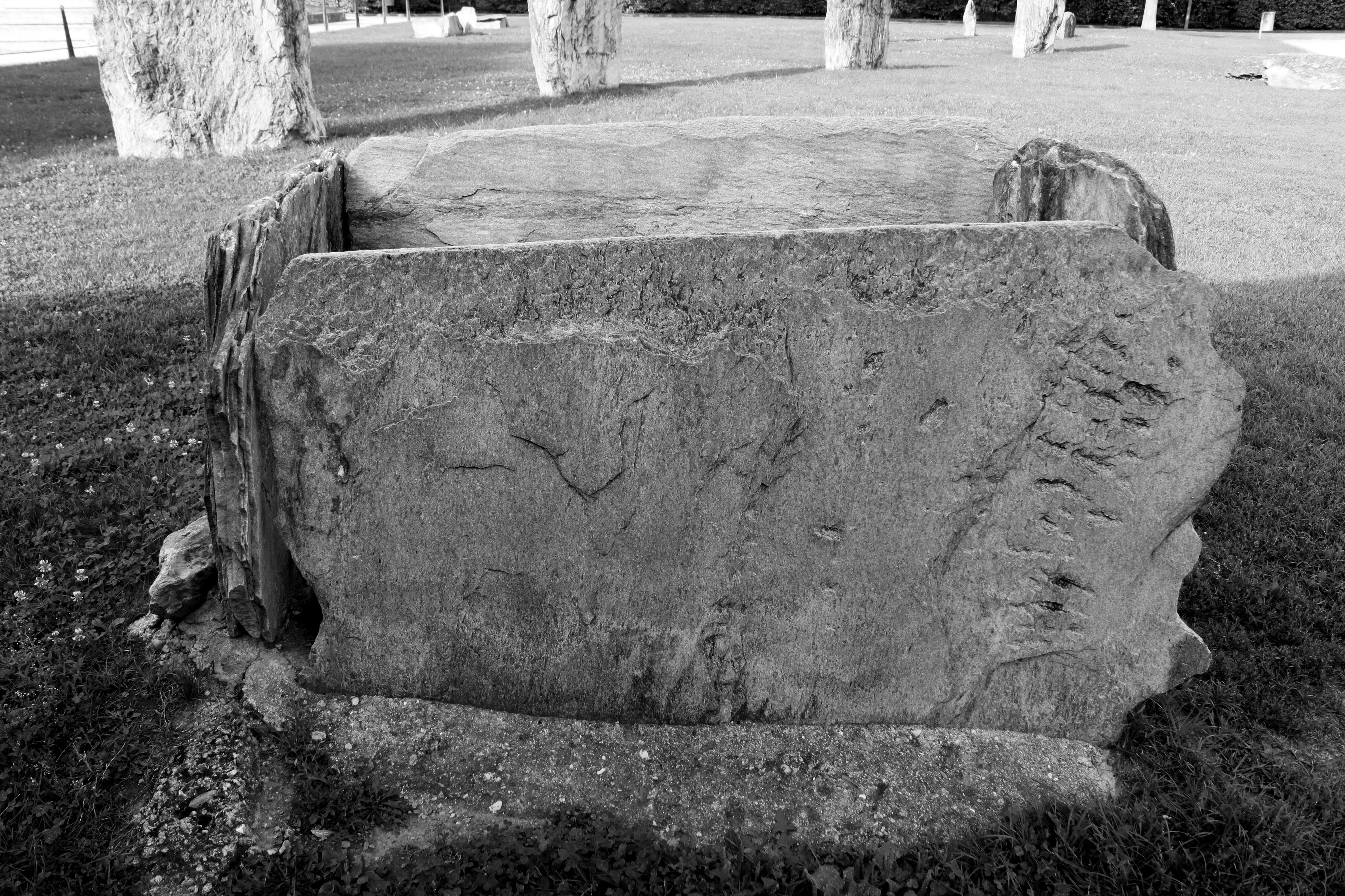 Suisse, canton du Valais, Sion, la ville : la nécropole du Petit-Chasseur et celle de Sous-le-Scex témoignent de l'occupation de la ville dès le néolithique. Petite tombe en dalles de pierre du Néolithique final.